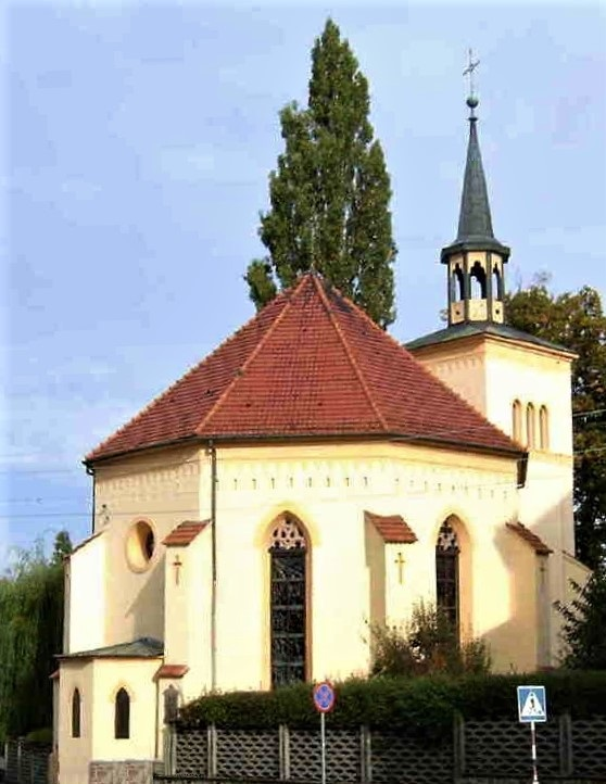 Dzierżoniów - Kościół Świętej Trójcy Autor: Lzur